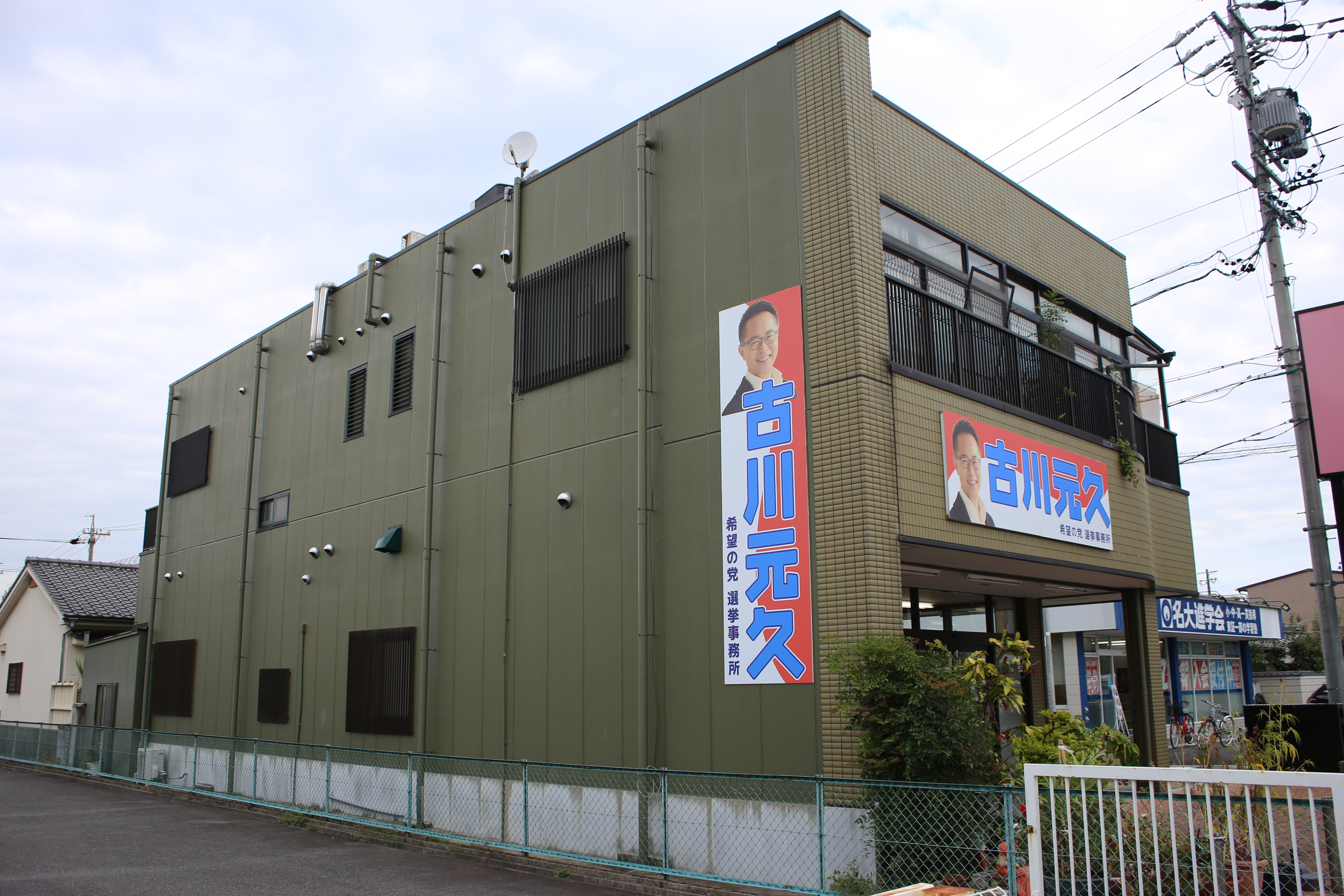 名古屋市守山区小幡五丁目の希望の党古川元久選挙事務所